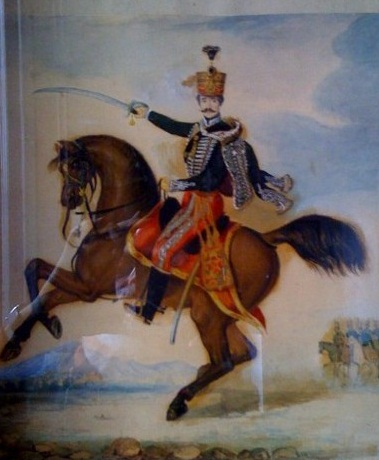 Il conte Alessandro Annoni (1770-1825) in una miniatura in ceramica d'inizio Novecento